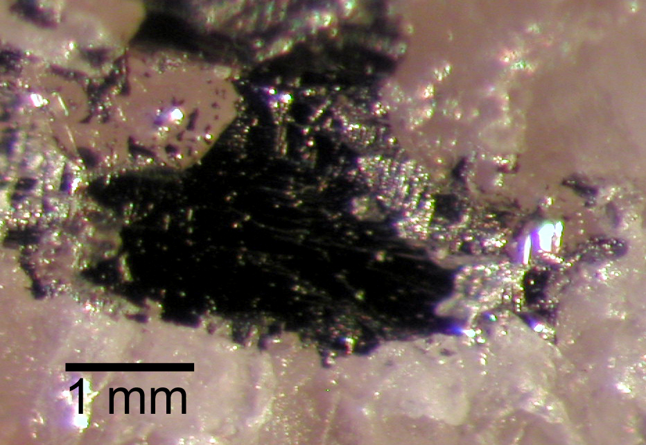 Tellurium on quartz (Moctezuma, Sonora, Mexico)